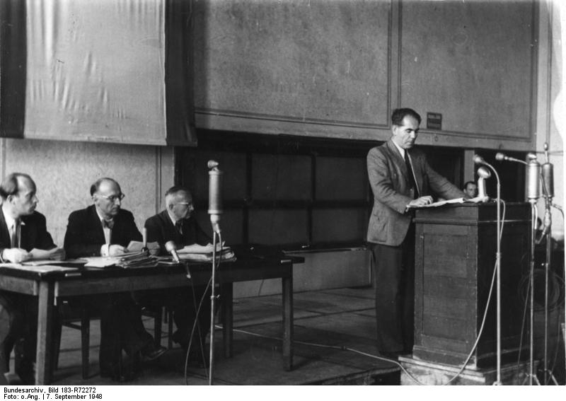 Berlin, Stadtverordneten-Versammlung ADN-ZB-Illus-dpd Berlin: Im Studentenhaus am Steinplatz fand gestern eine außerordentliche Stadtverordneten-Versammlung statt. Franz Neumann während seiner Rede, 1. Dr. Suhr Abgebildete Personen: Neumann, Franz: Vorsitzender der SPD Berlin-West, Bundestagsabgeordneter (MdB), Bundesrepublik Deutschland